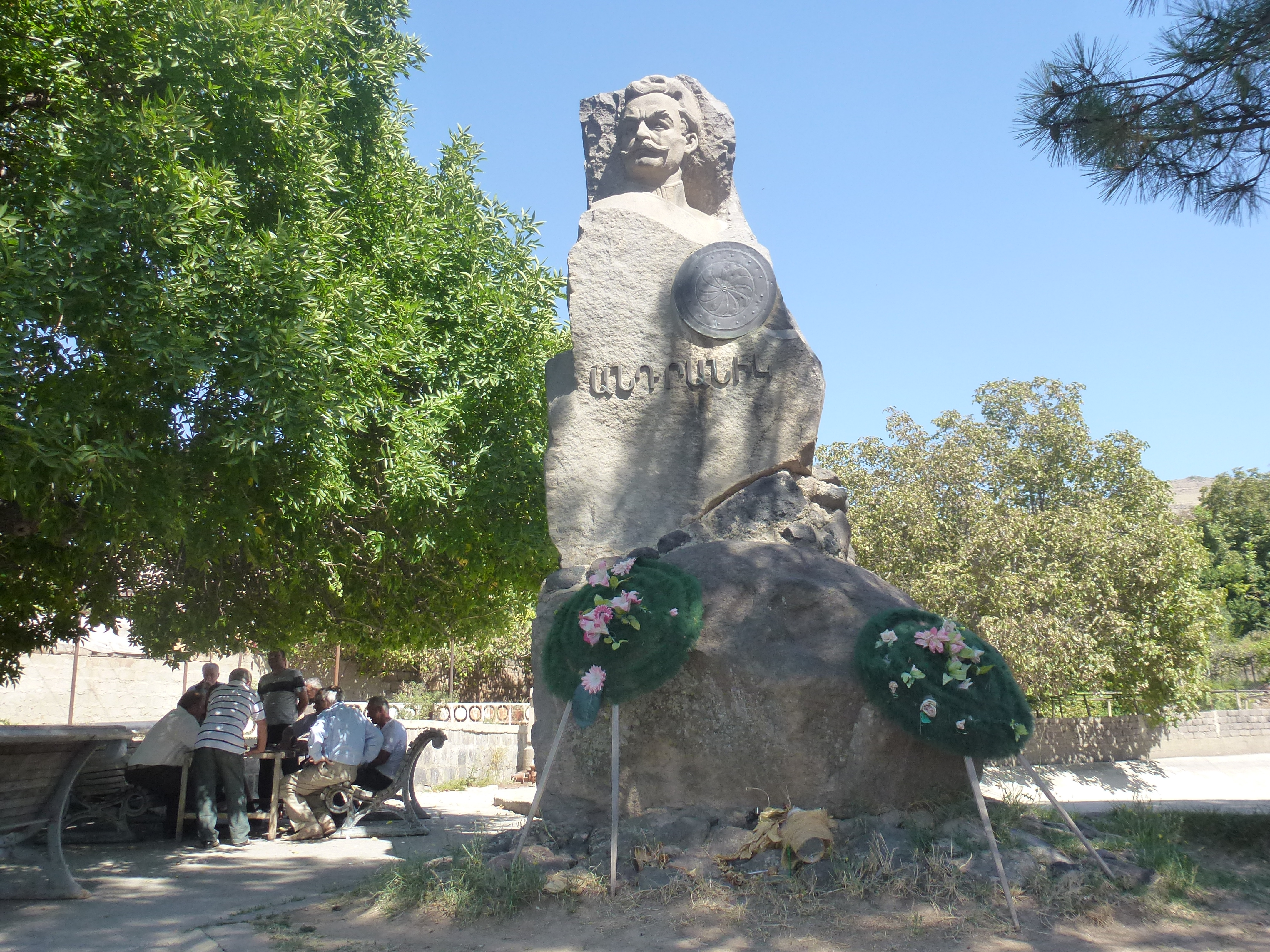 Ուջան, Արագածոտնի մարզ, ՀՈՒՇԱՐՁԱՆ` ԶՈՐԱՎԱՐ ԱՆԴՐԱՆԻԿԻ 1967 թ. գ. մ. քանդ.՝ Մ. Ավետիսյան 109/9